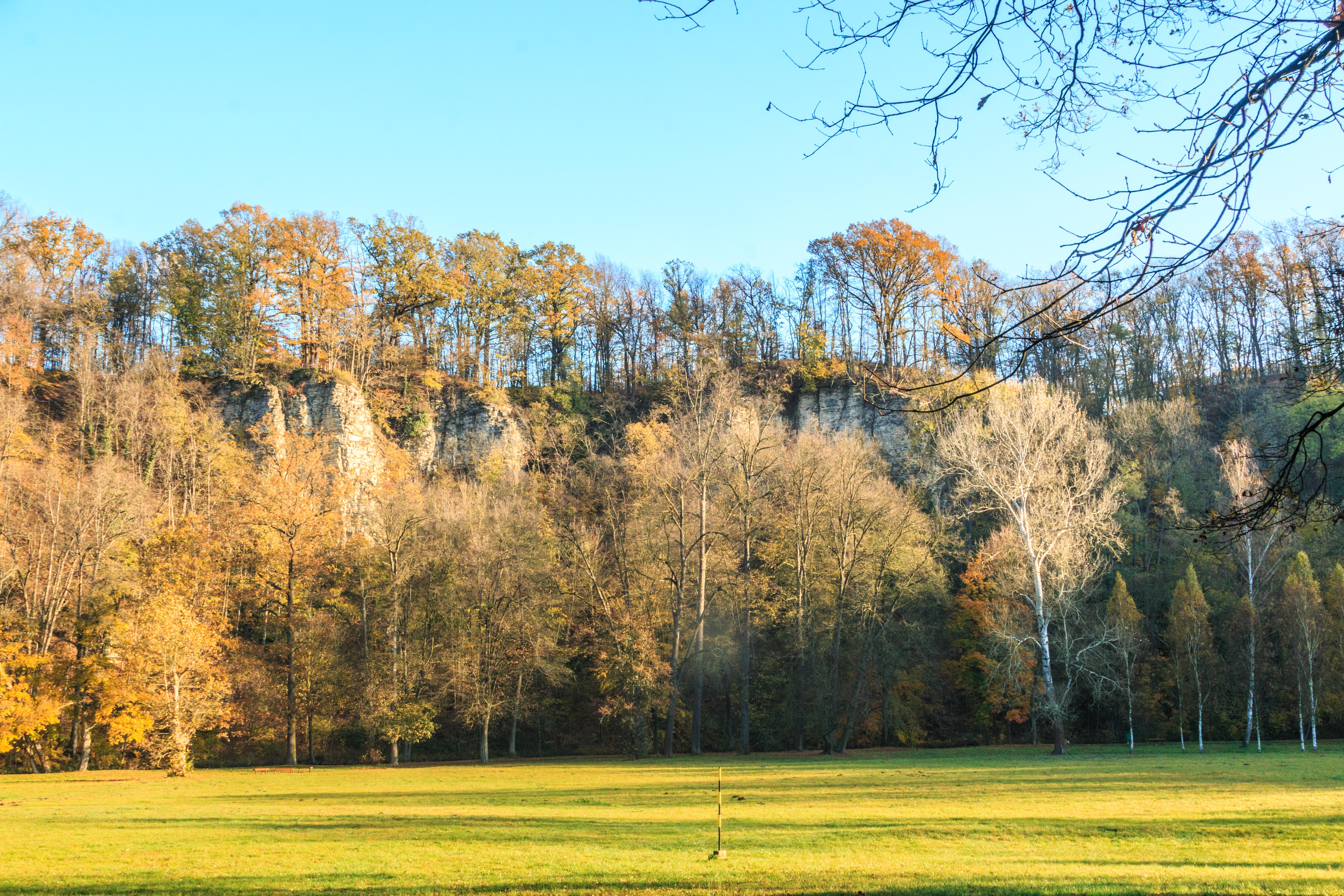 Peliny u Chocně